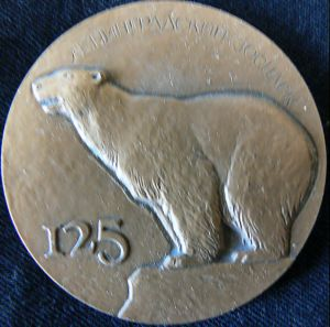 Памятная медаль "125 лет ленинградскому зоопарку" (аверс)